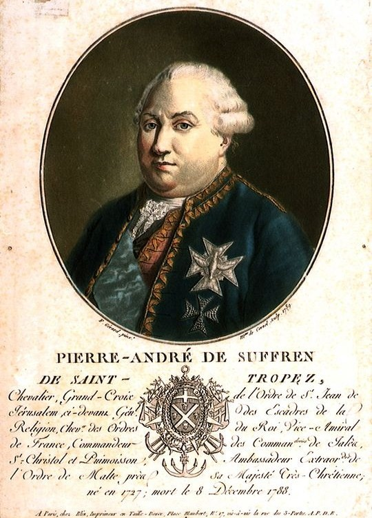 Pierre-André de Suffren (1729-1788).